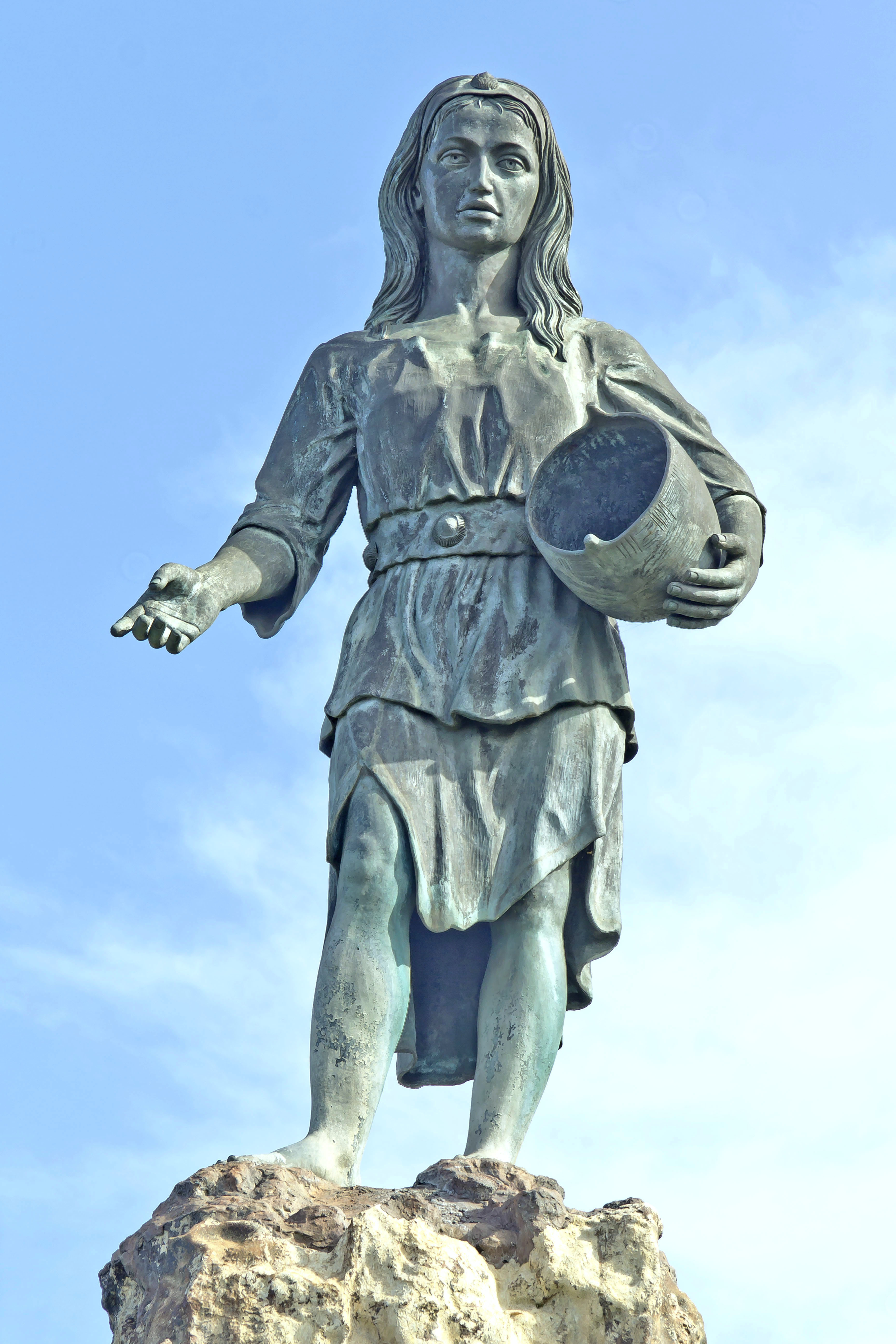 Fuente de la Princesa Dácil situada en la vía de entrada a La Orotava por El Ramal / Estatua creada por los artistas Ezequiel de León Cruz y Cristo Quintero